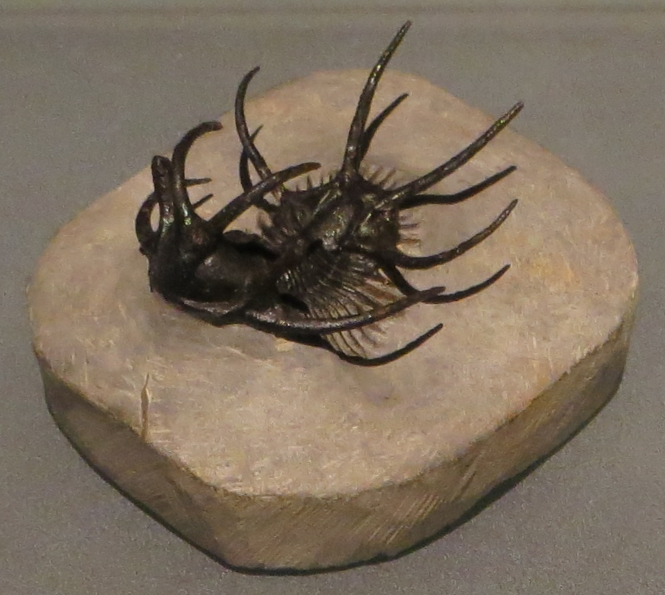 Fossil - Took the picture at Musee des Confluences, Lyon